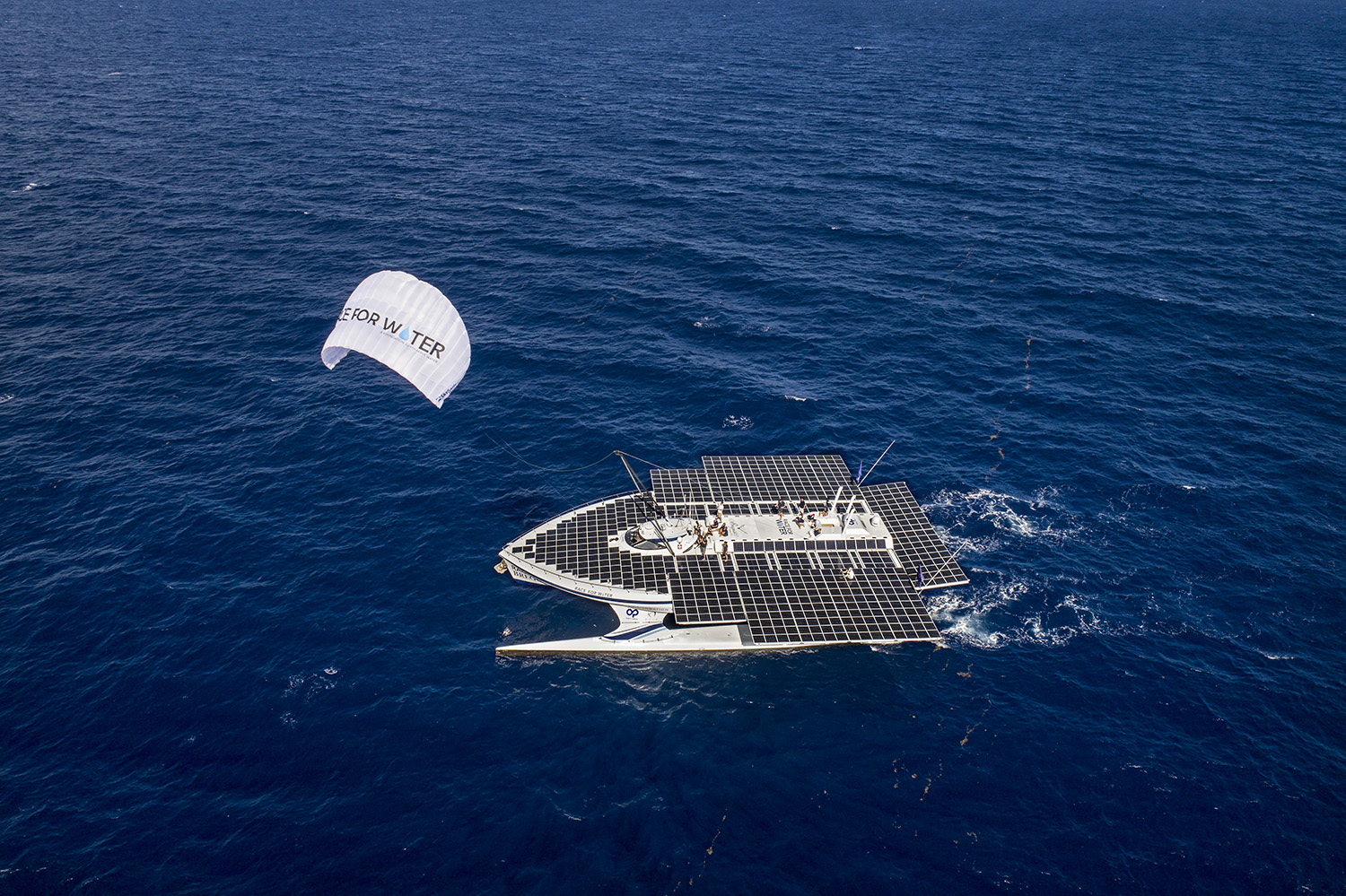 Race for Water sous kite